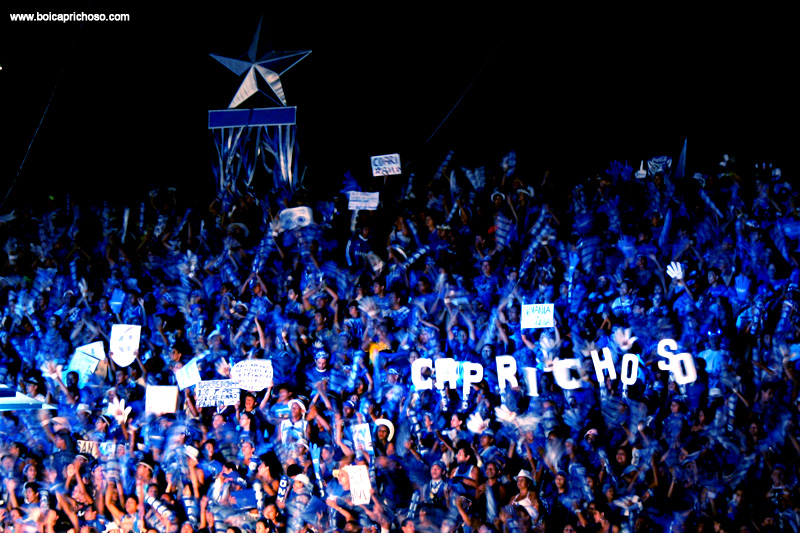 Galera Campeã do Festival 2011